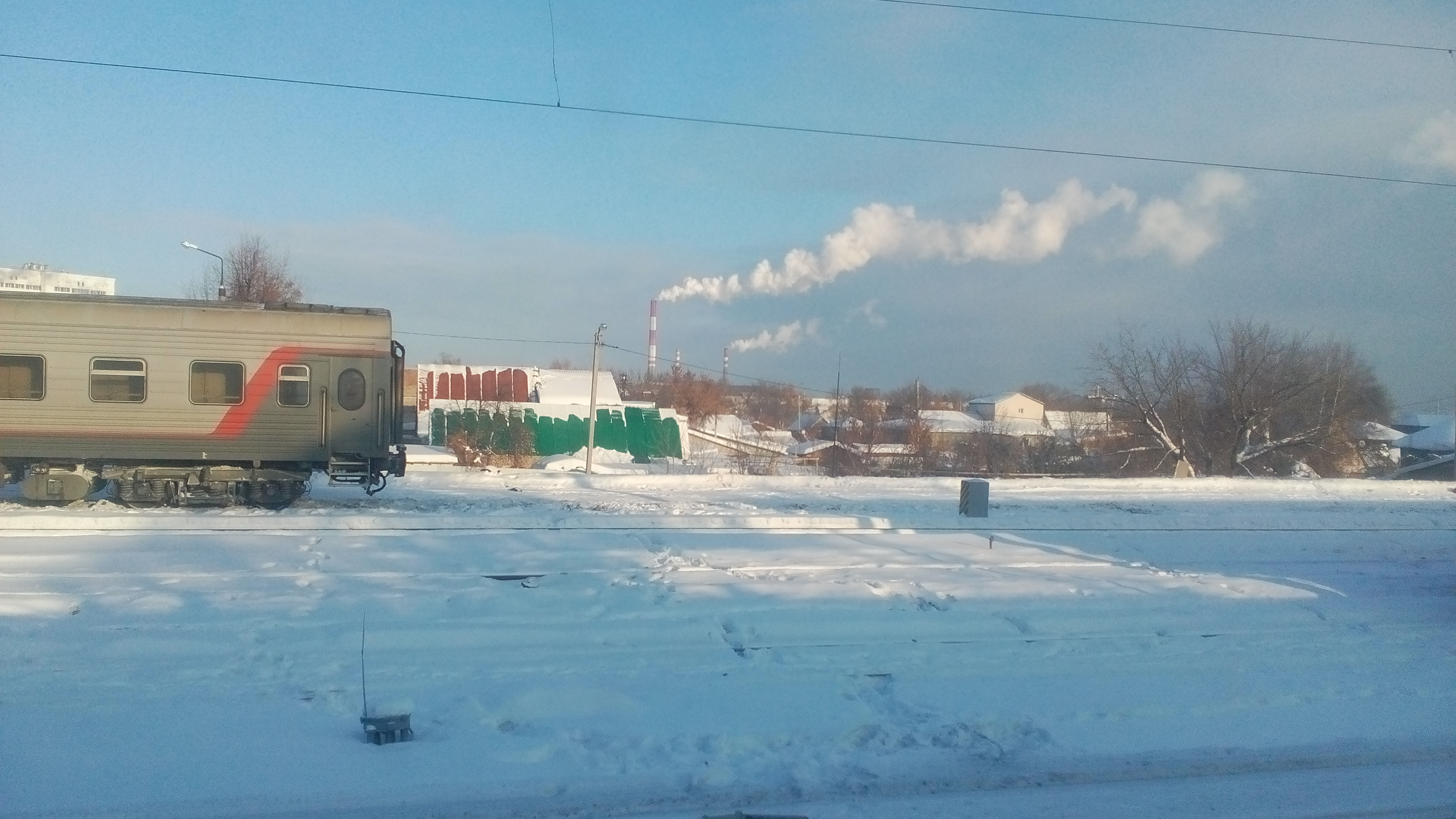 Вид на Пензенскую ТЭЦ-1 со стороны ЖД-вокзала